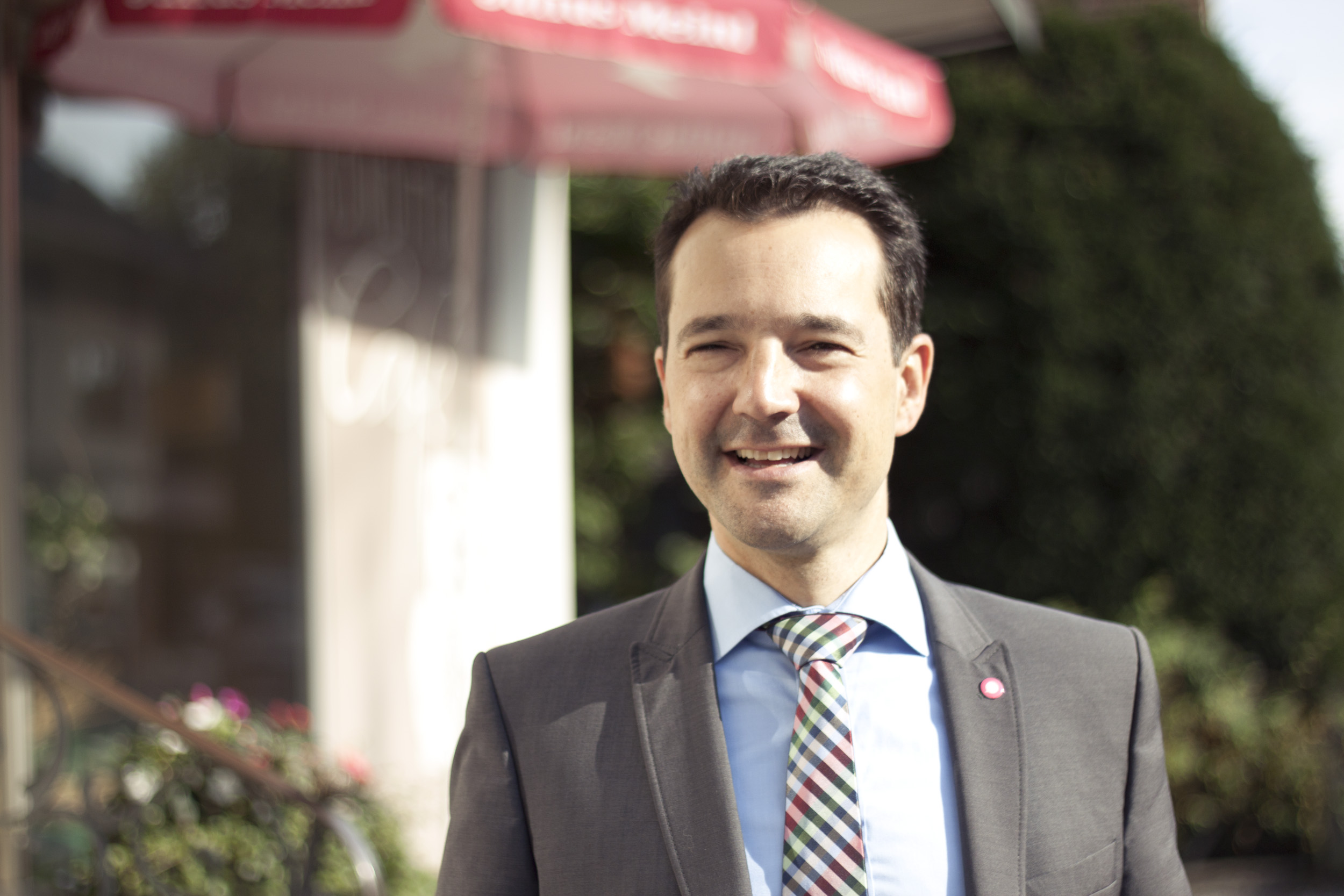 NEOS-Nationalratsabgeordneter Gerald Loacker